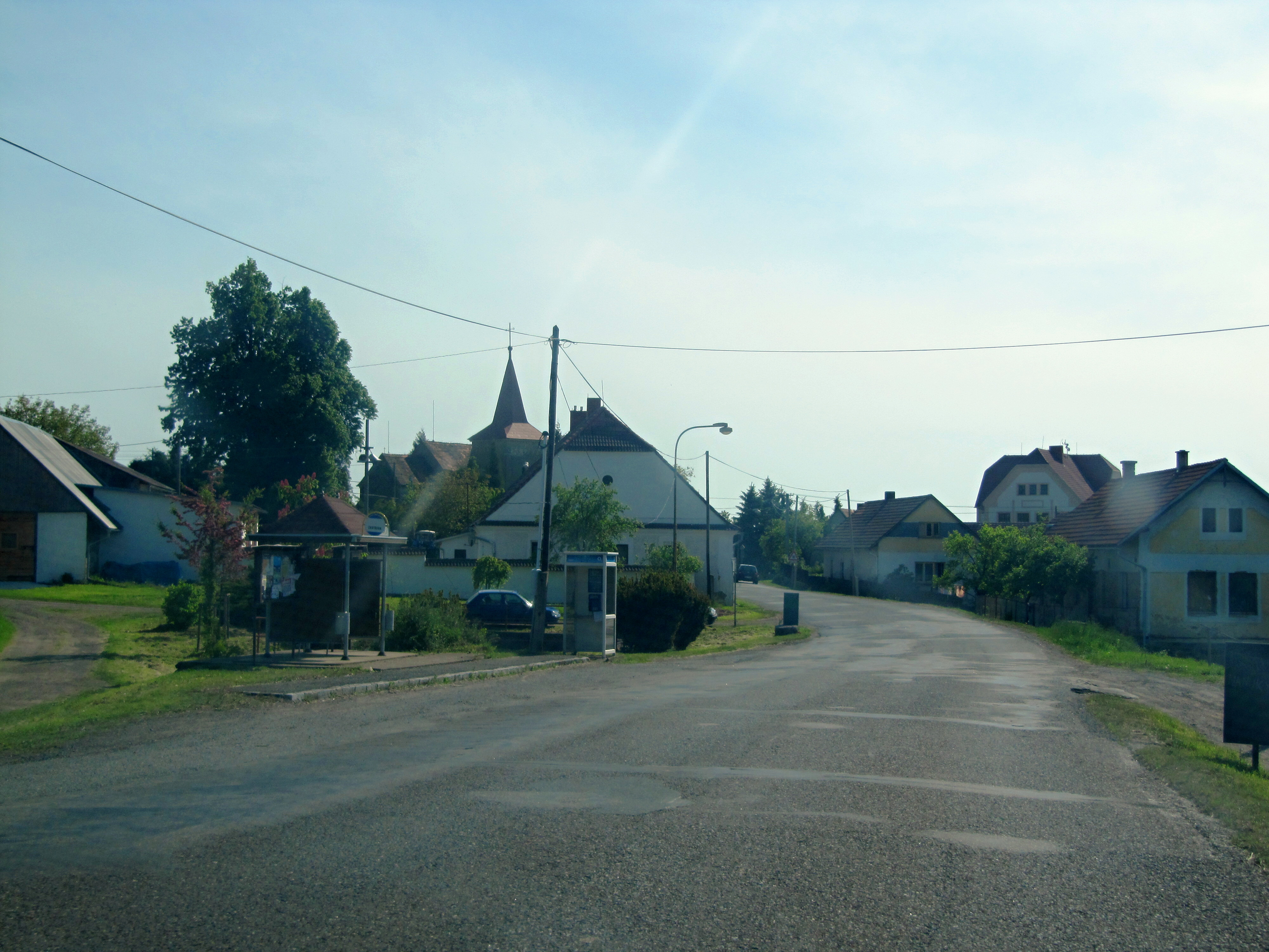 Slavošov